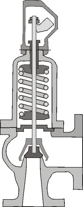 Proportional-Sicherheitsventil